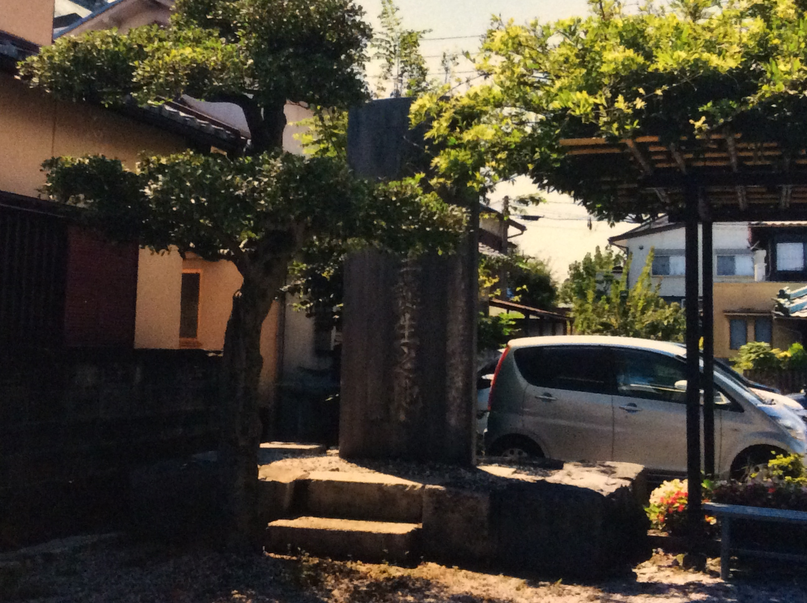 大垣市 関谷清景生誕の地